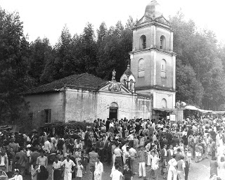 Foto da Festa de Santo Antônio em 1946, extraída dos arquivos paroquiais.